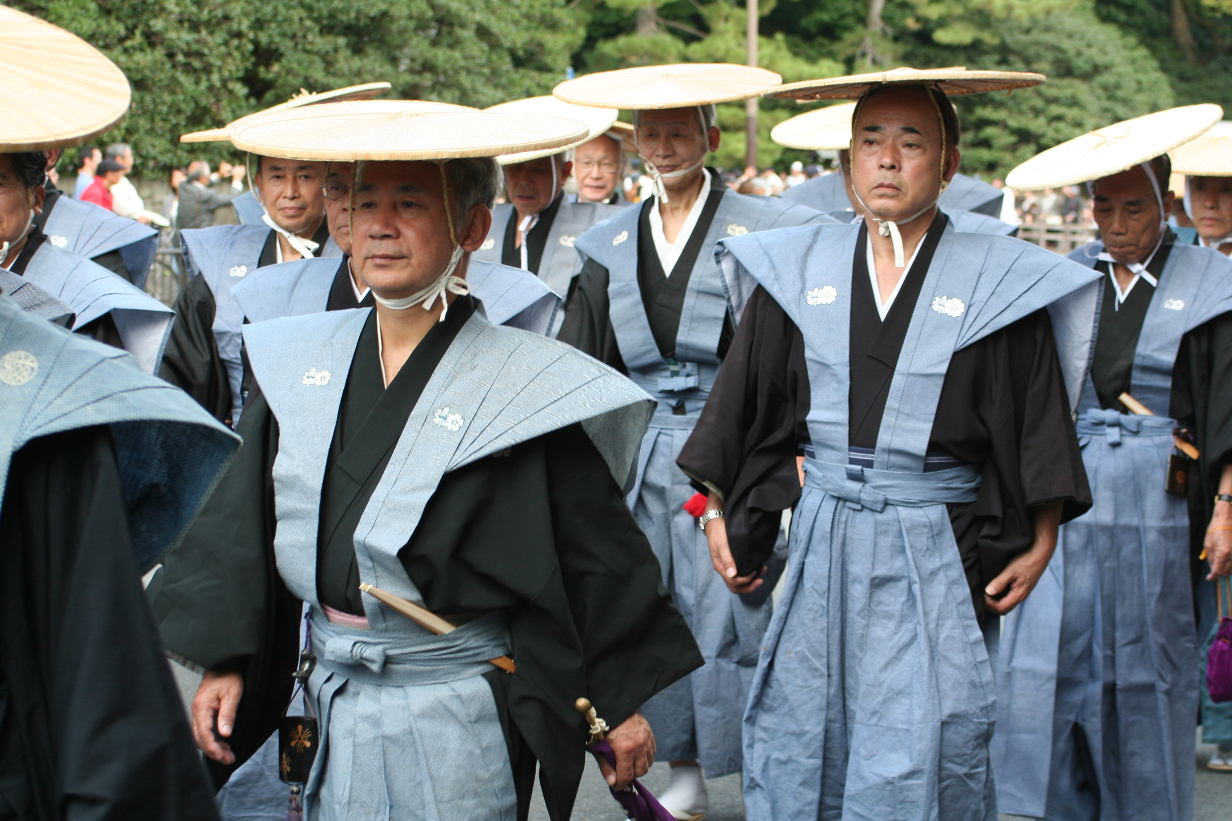 京都府京都市にて開催された時代祭。正午の御所から平安神宮までの行進の様子。2009年10月22日撮影。